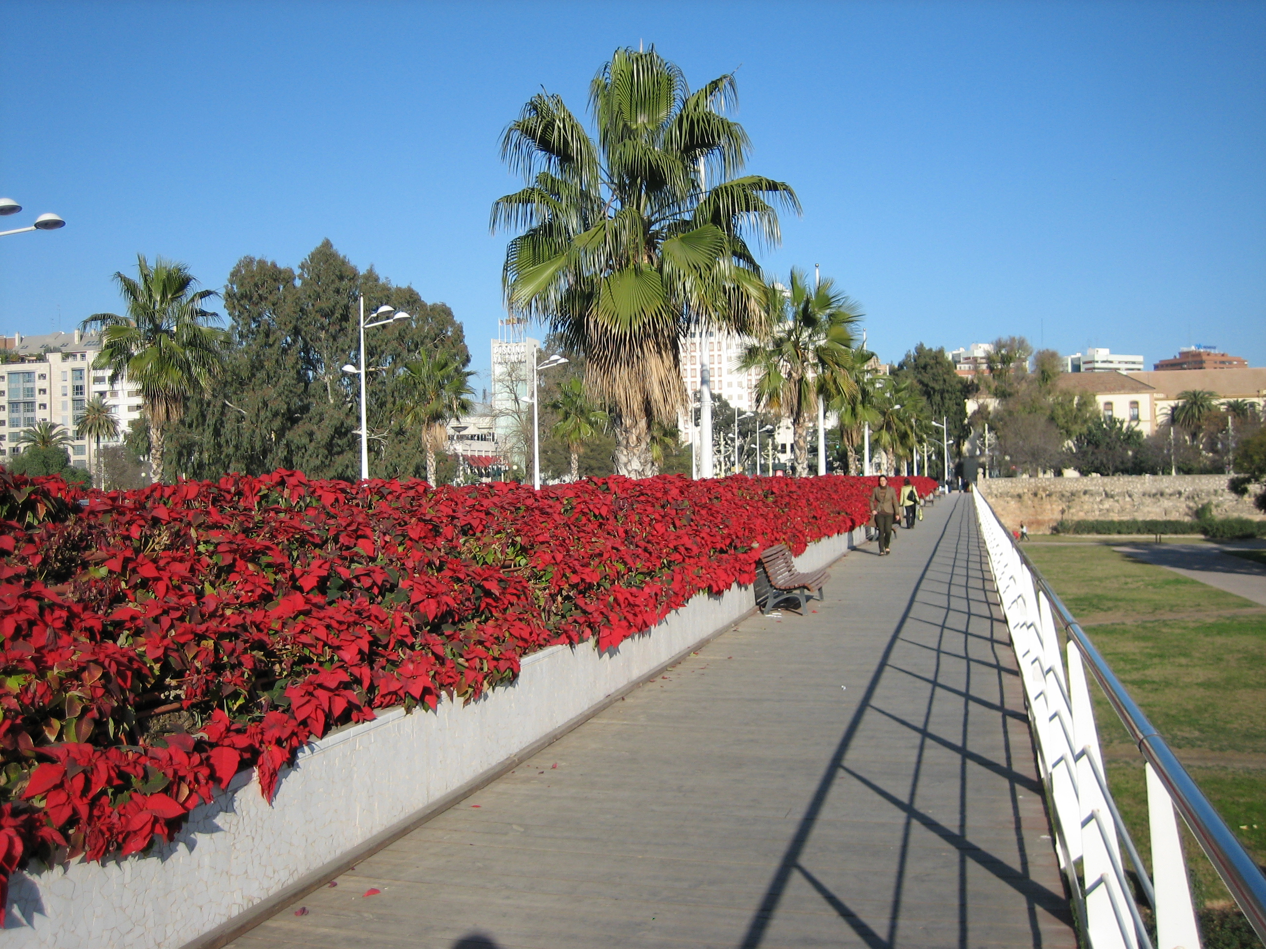 Con las flores de Navidad.